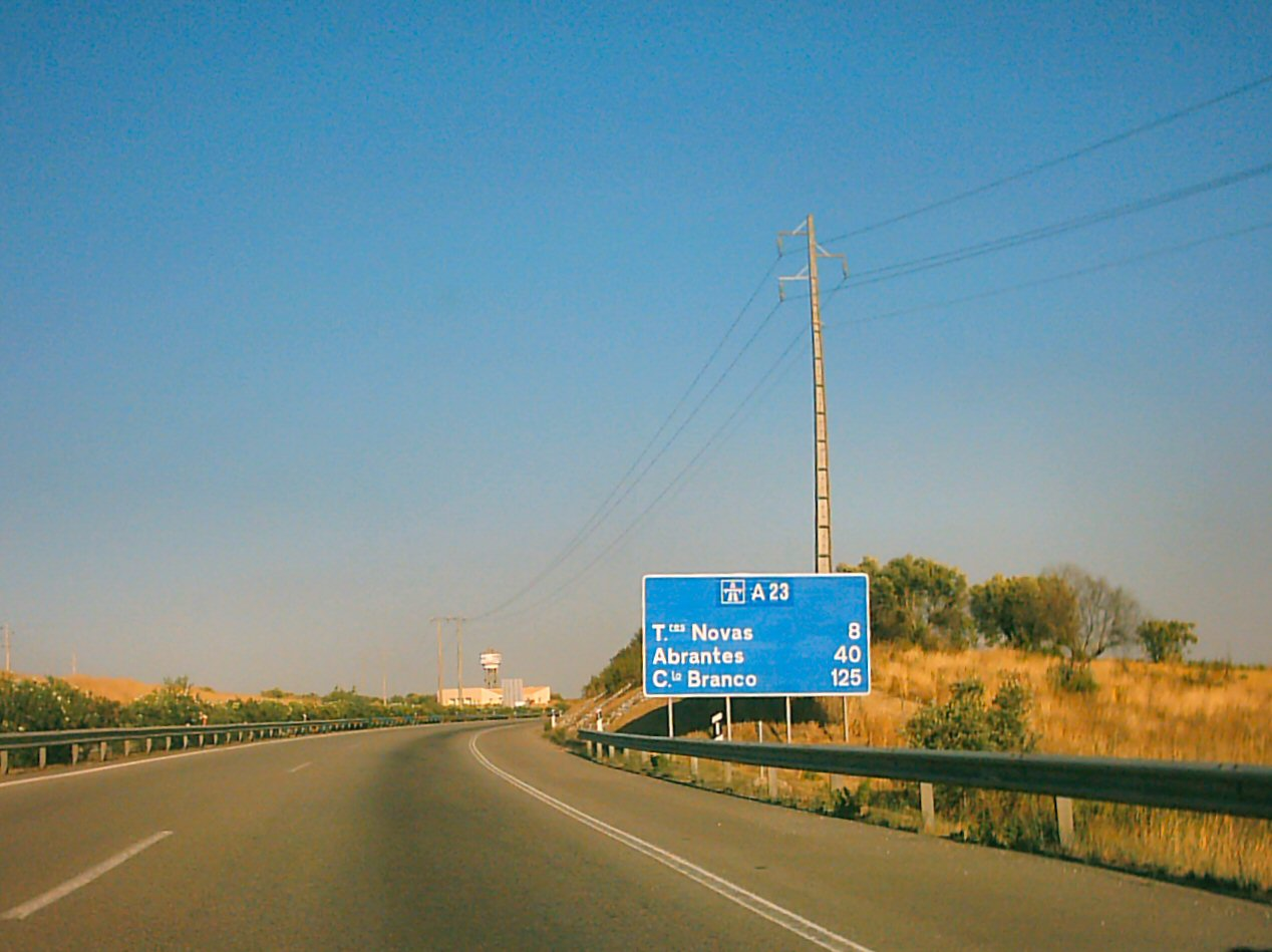 Auto-estrada A 23 em Portugal